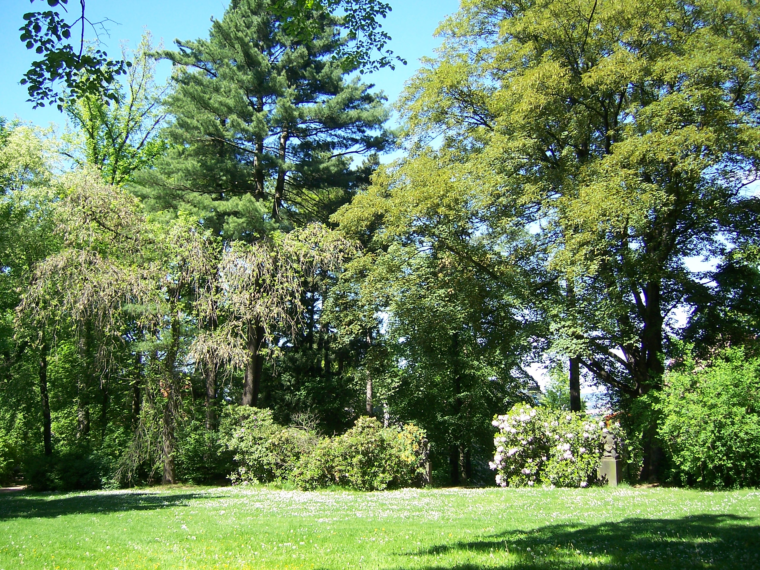 Der Fichtepark in Dresden-Plauen